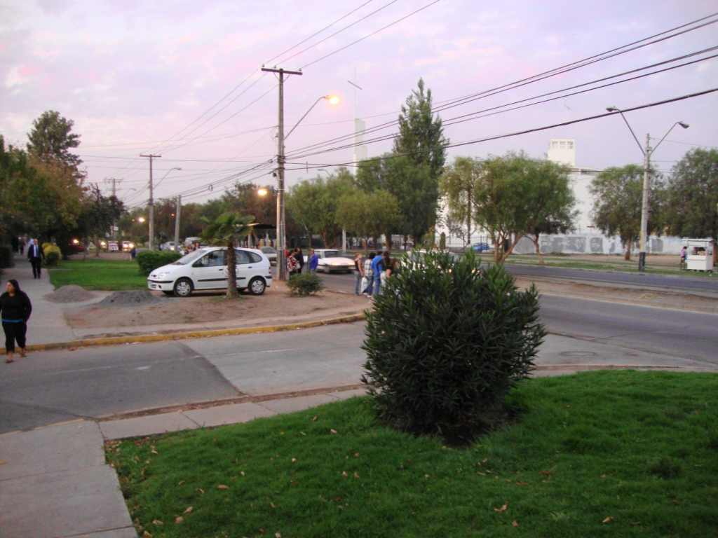 Imagen de la Avenida lo Errázuriz, Cerrillos, Chile